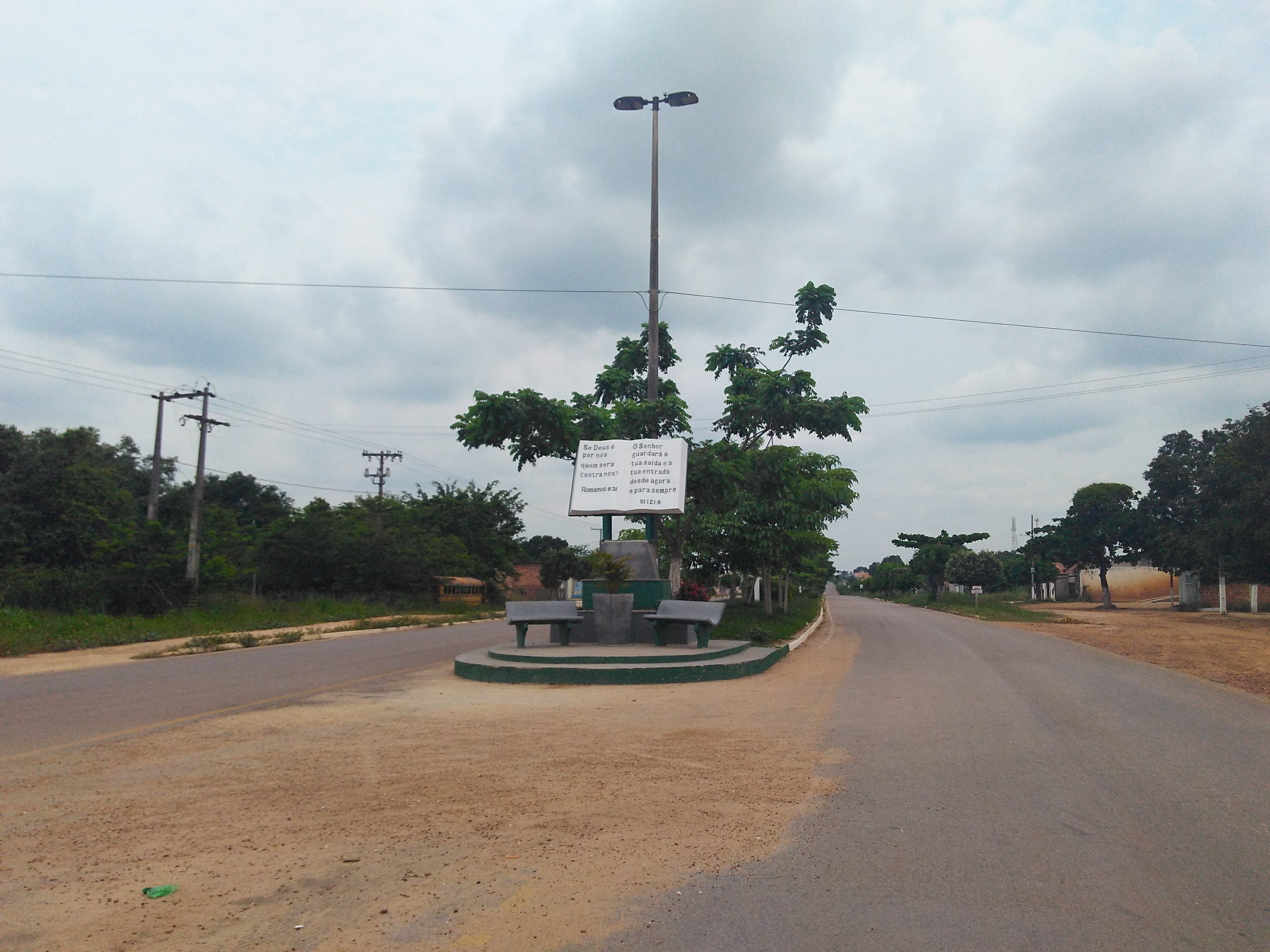 Monumento da Bíblia, na entrada de Bom Jesus, na BR-222.